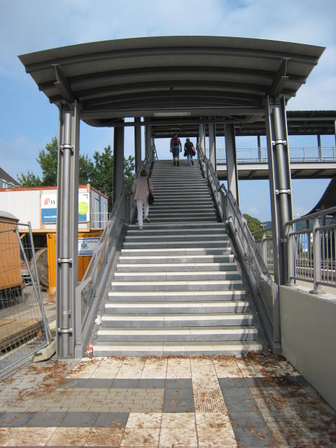 Treppe zum Übergang zu den Bahnsteigen in Overath während langwieriger Bauarbeiten. September 2014